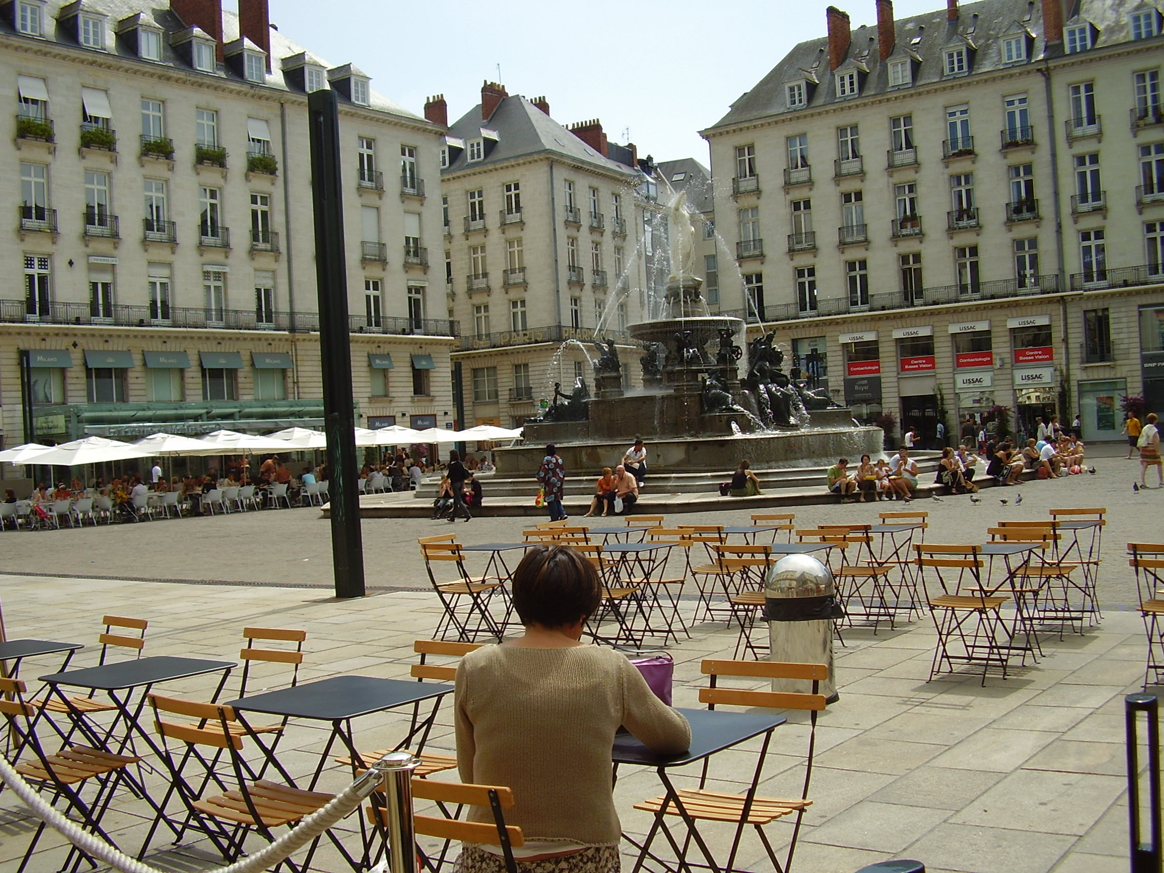 Nantes, France